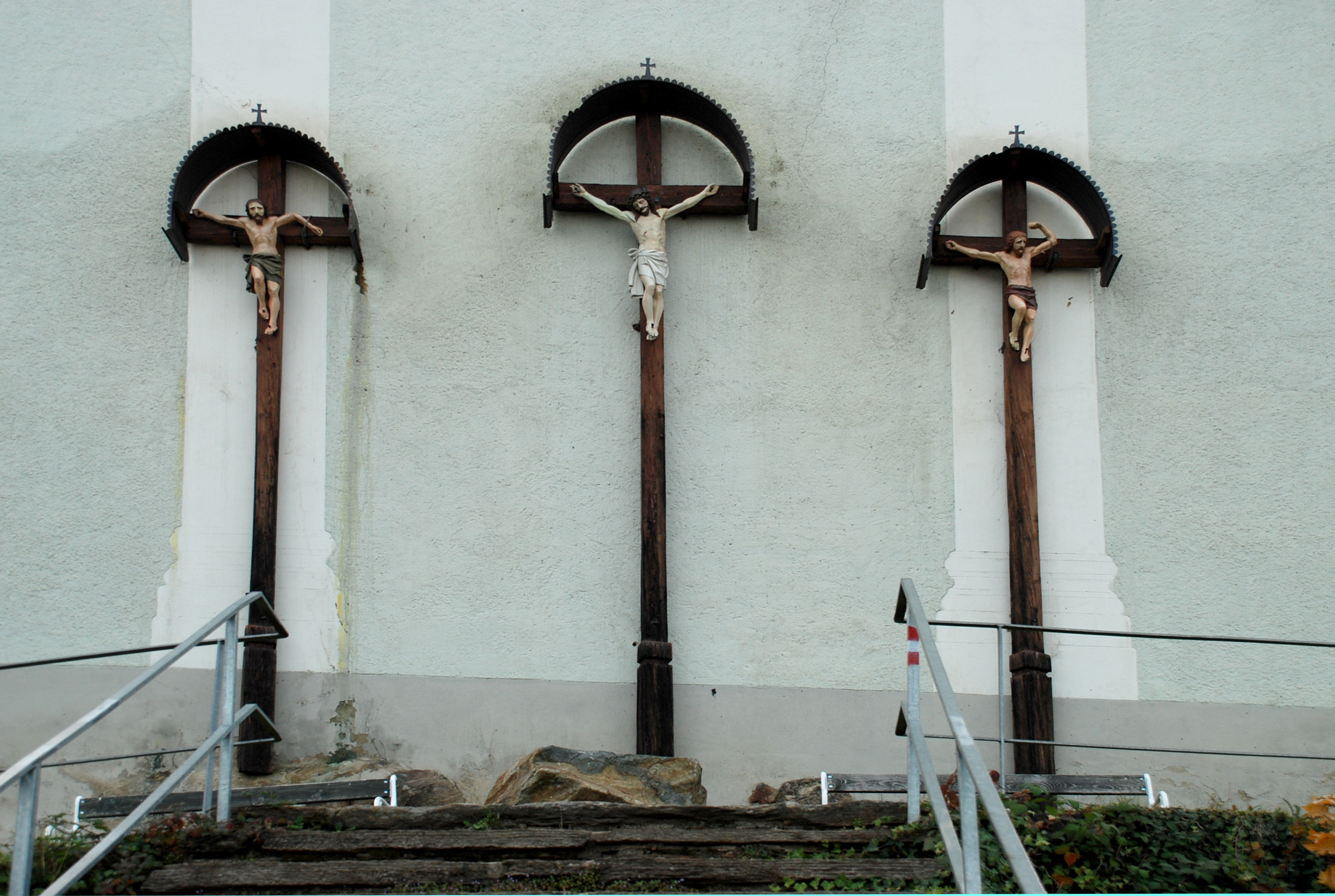 Schwanberg, Steiermark, Österreich: Kirche St. Josef auf einem Hügel westlich des Hauptplatzes Object location46° 45′ 19.57″ N, 15° 11′ 48.1″ E The above coordinates are missing from linked Wikidata item M17459247. Click here to copy it